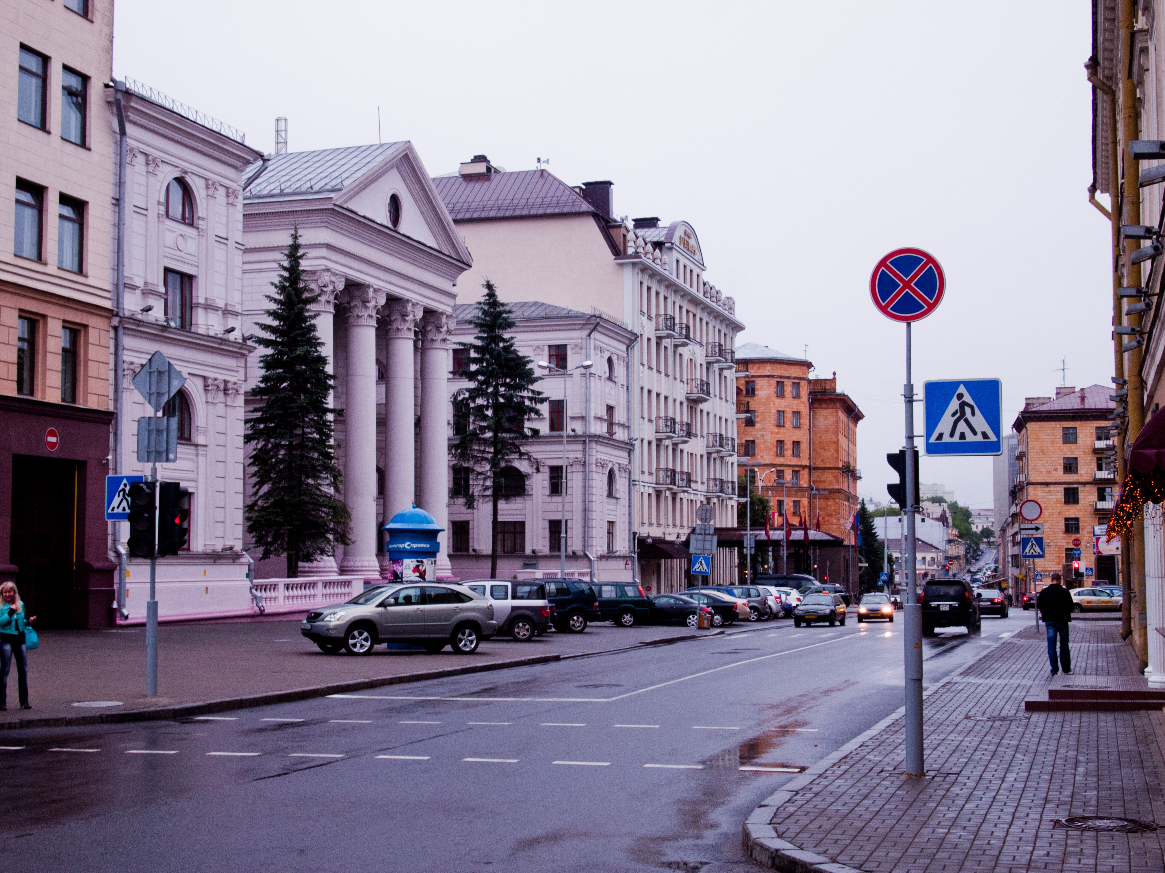 Музыкальная академия